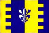 vlajka obce Částkov